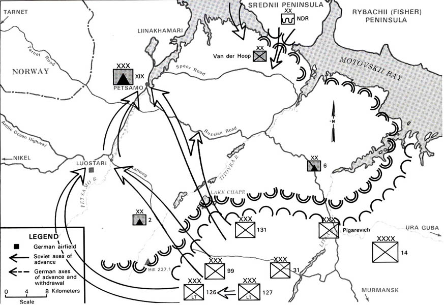 Soviet offensive plan for Petsamo-Petsamo-Kirkenes Operation.